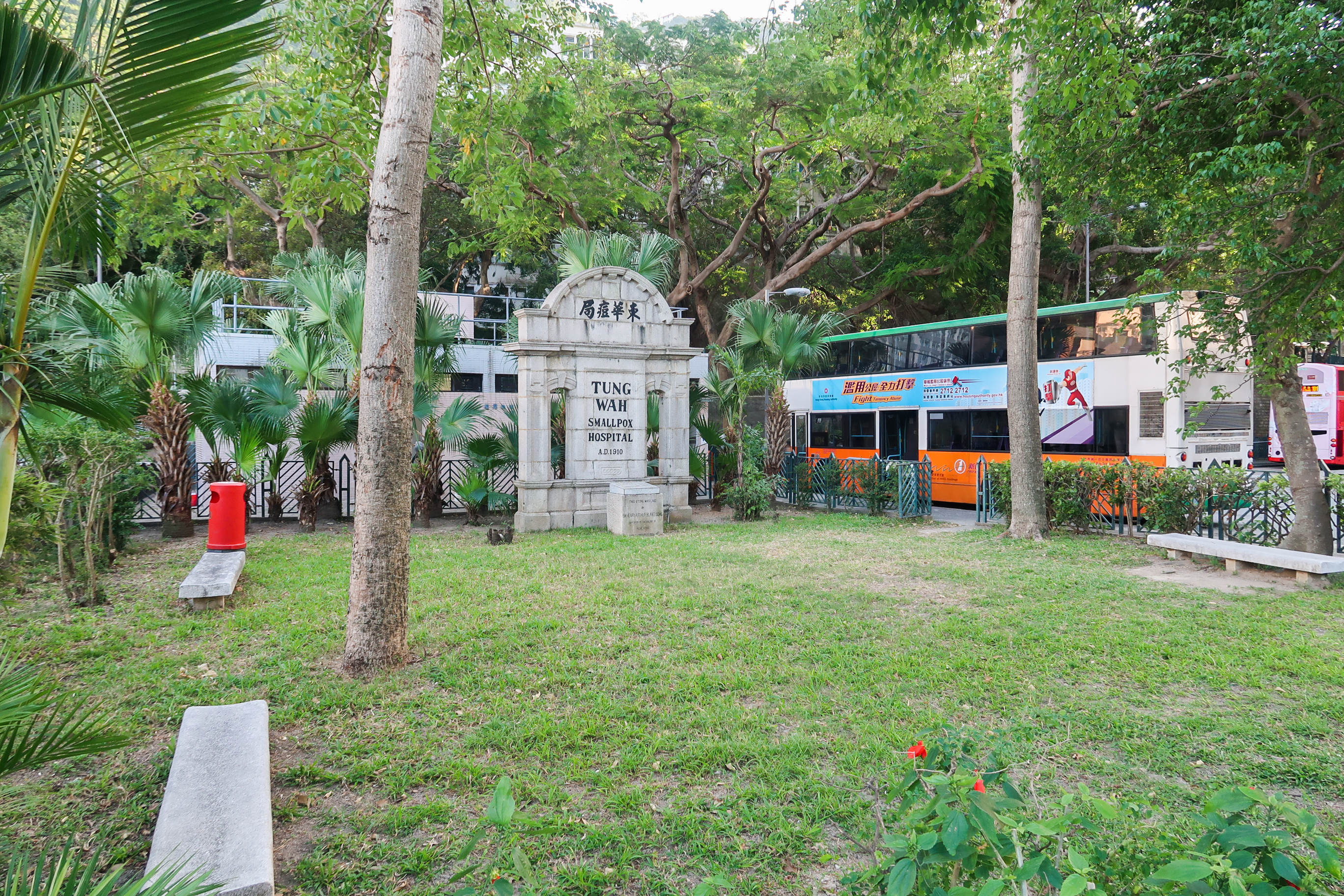 Tung Wah Smallpox Hospital signs